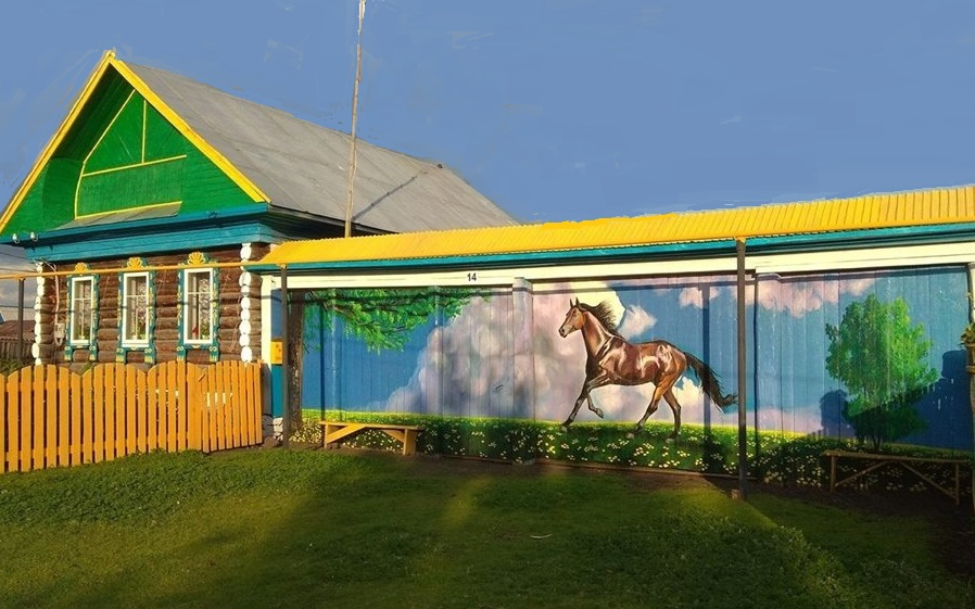 Учалы районы, Ҡобағош ауылы. Ҡапҡа менән ҡойма. 2018.